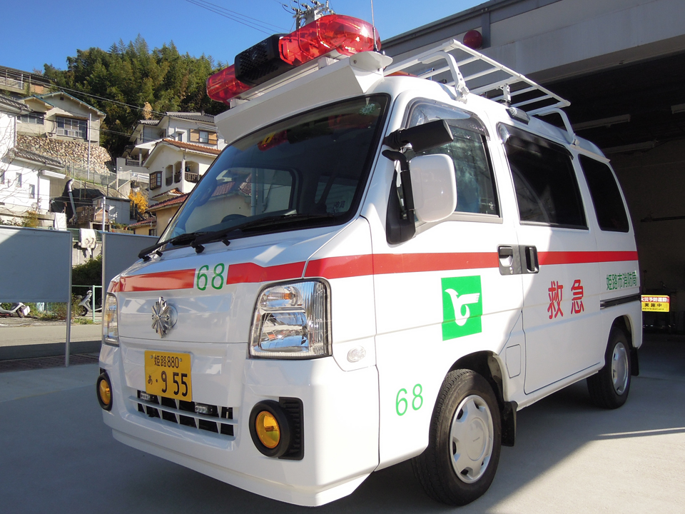 軽救急車 （姫路市役所家島地域事務所）